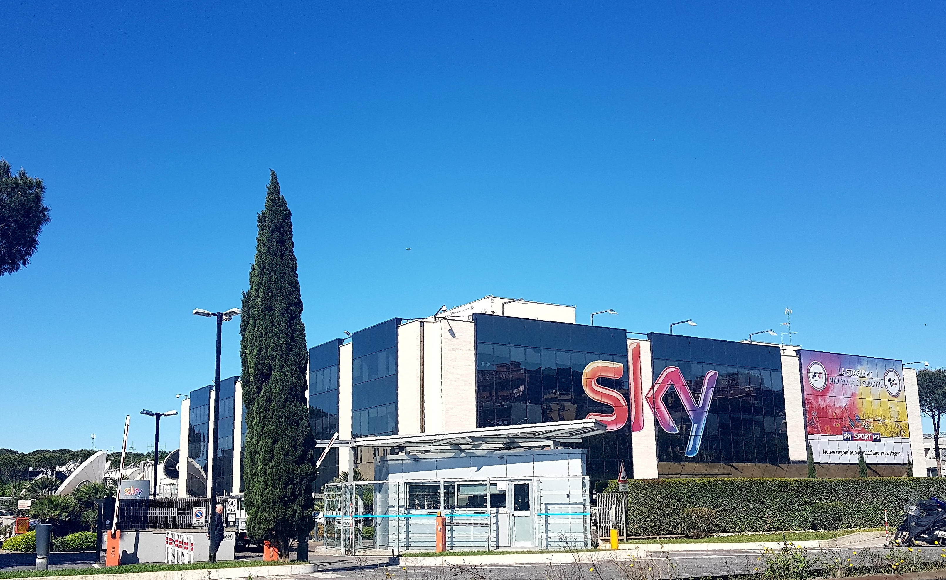 Sky Italia, sede di Via Salaria 1021